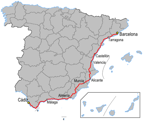 Mapa de la carretera N340